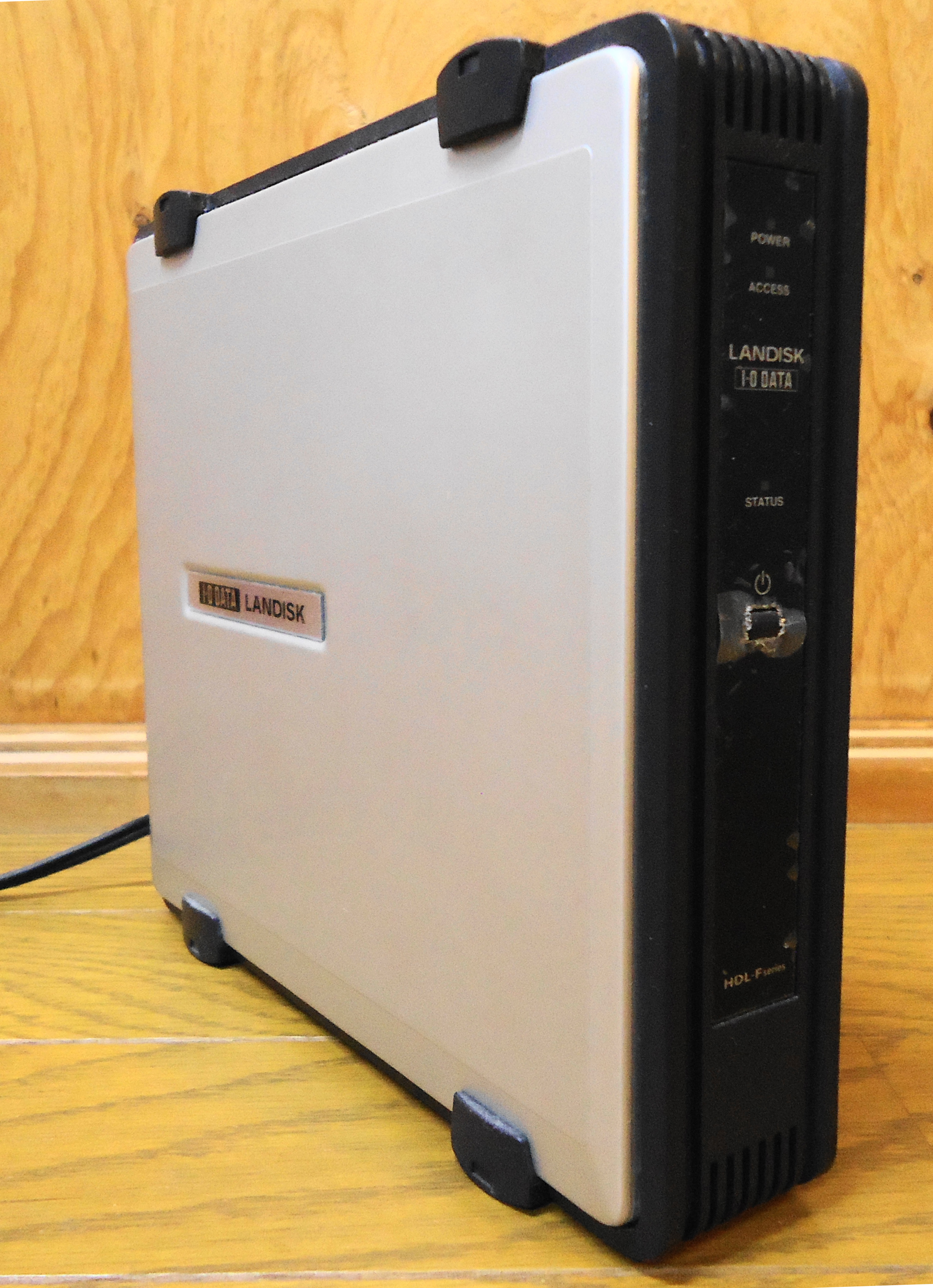 アイ・オー・データ機器製NAS HDL-F250の写真